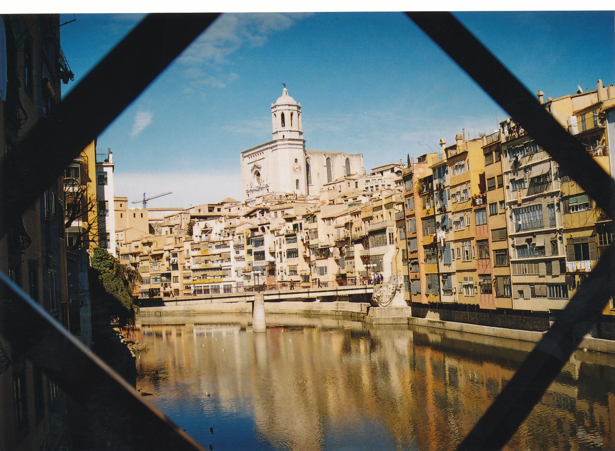 Die Kathedrale von Girona oberhalb des Flusses Onyar - durch die Brücke Gustave Eiffel fotografiert Datum: 04/2008 Urheber: Michael Pfeiffer Quelle: Privates Fotoalbum des Urhebers